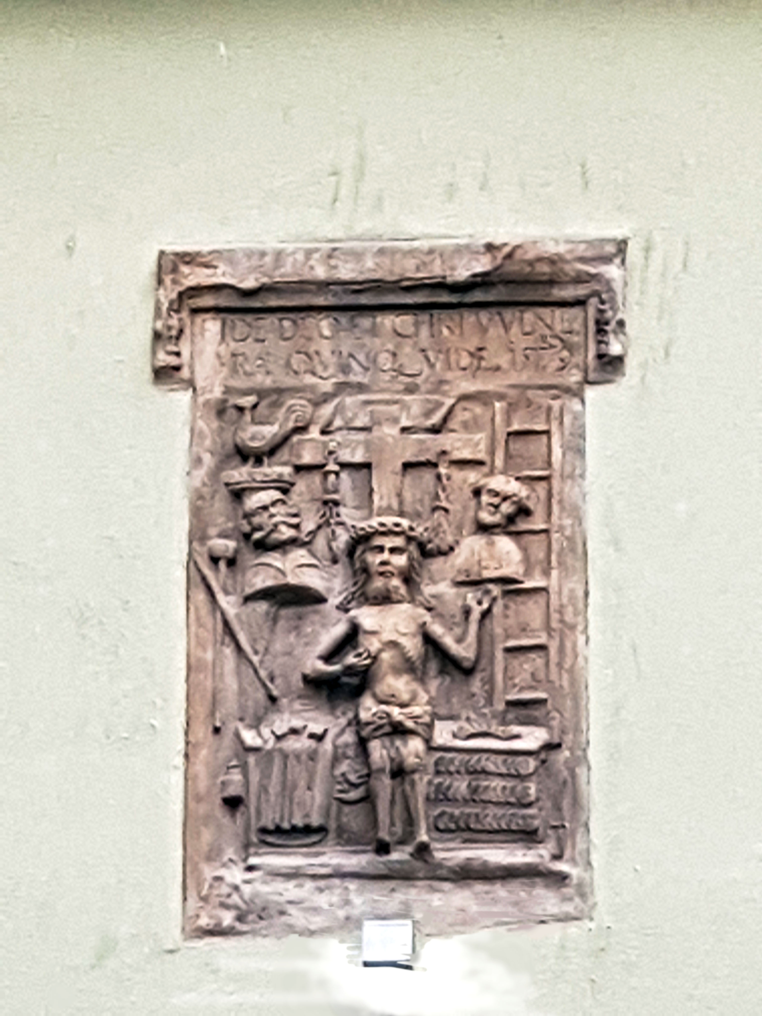 Średniowieczny relief na elewacji tylnej kamiency Rynek 26 przedstawiającym postać Chrystusa z atrybutami męki, z łacińską inskrypcją: "Ufaj Bogu i patrz na pięć ran Chrystusa", z datą przebudowy(1528) i z wizerunkami dwóch fundatorów